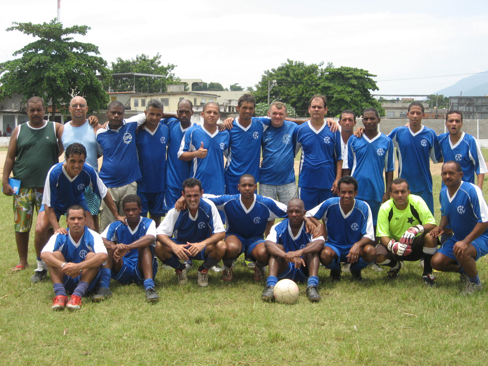 Equipe de Masters do Éden Futebol Clube em 2009.